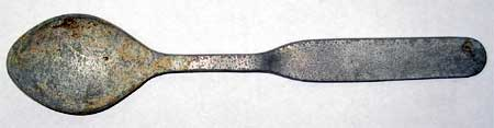 Laboratoryjna łyżka do spalań - zdjęcie własne